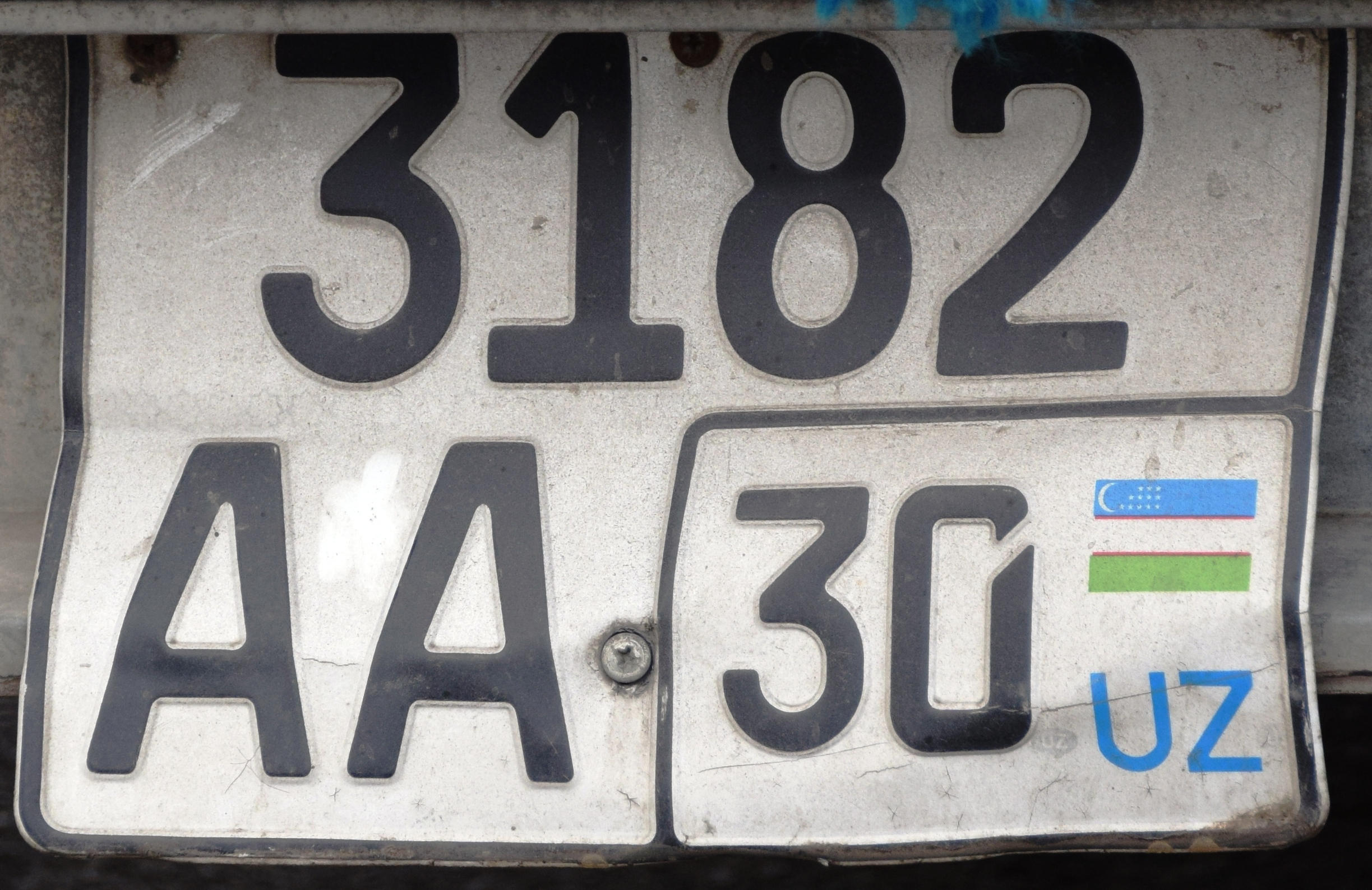 kentekenplaat uit Oezbekistan